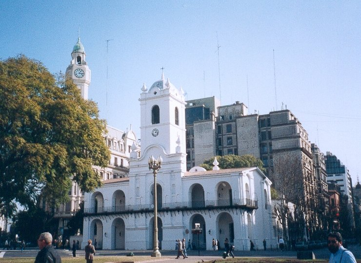 Lieu: Cabildo, place de mai, Buenos-Aires Auteur de la photographie : Georgio Date: août 1992